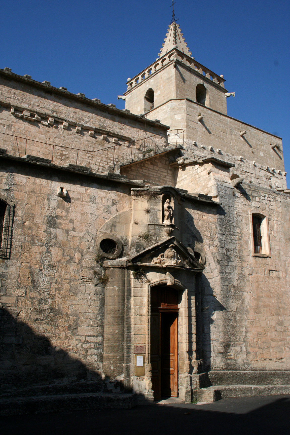 L'église de Venasque